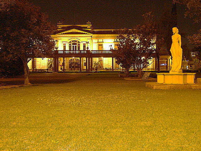 Casa de la Cultura de la ciudad de San Luis Potosí, México.